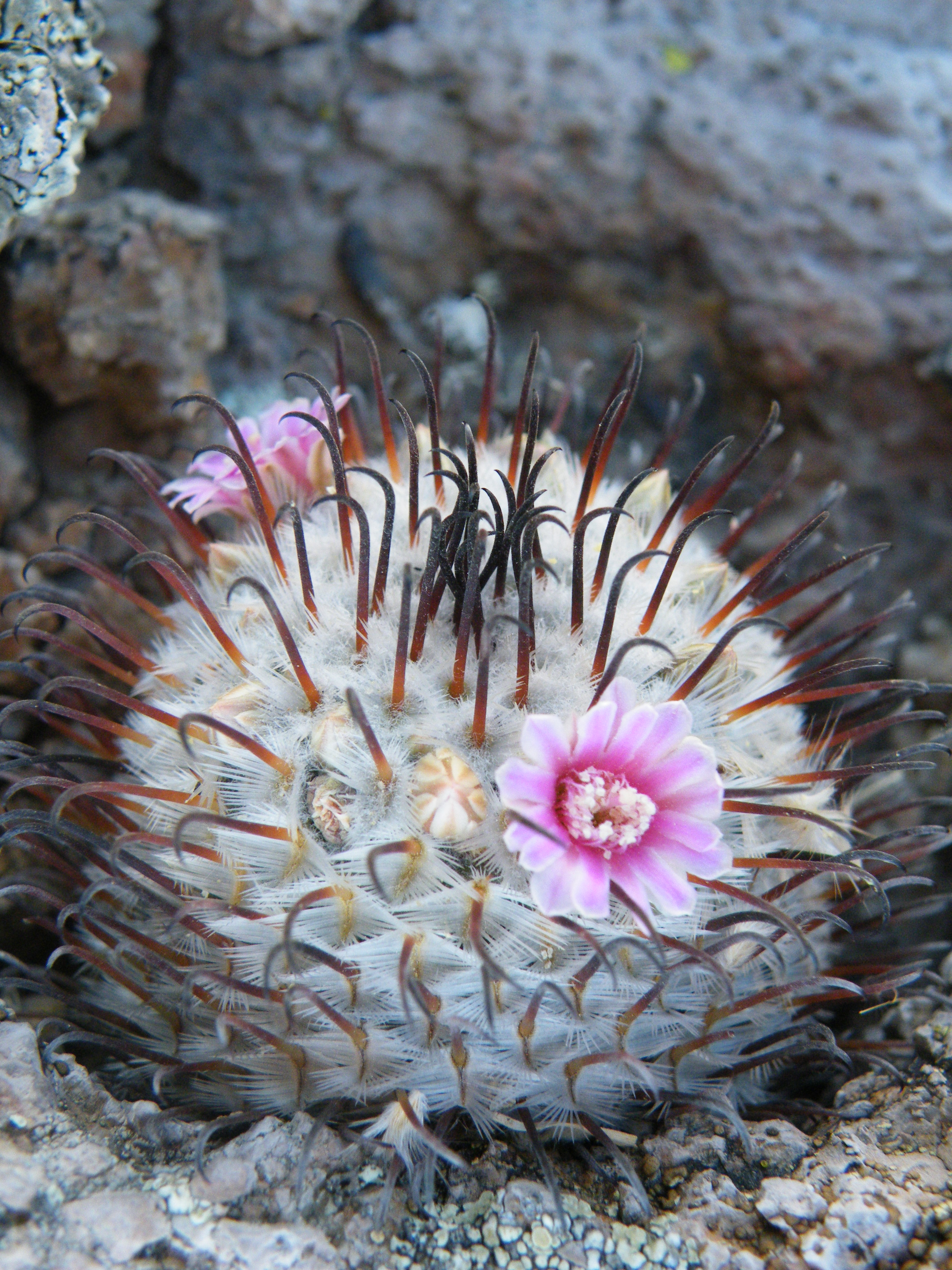 Mammillaria perezdelarosae. Near el Ocote, Aguascalientes